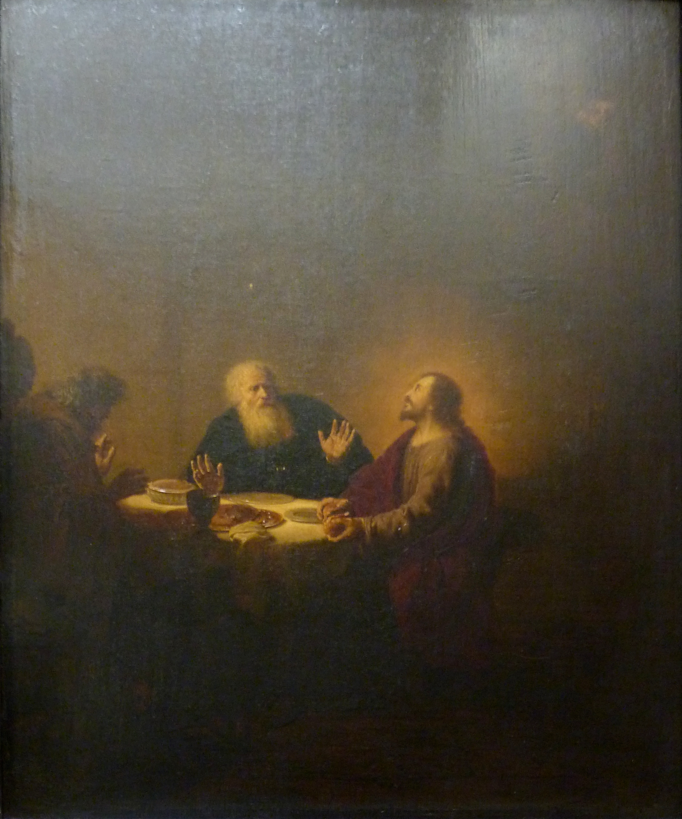 ArtistDirck von SantvoortTitle